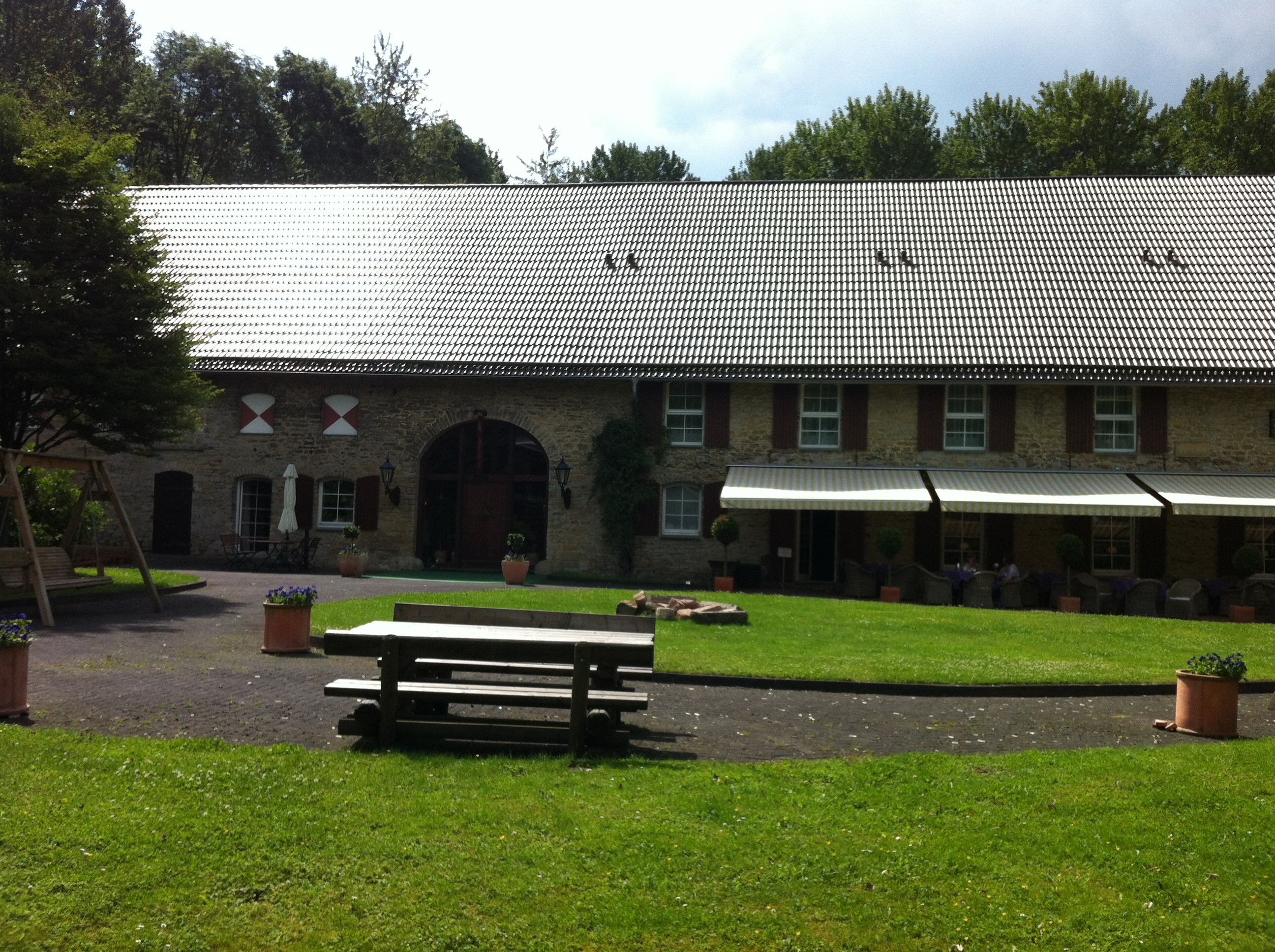 Ansicht Gut Rothensiek - Kälberstall